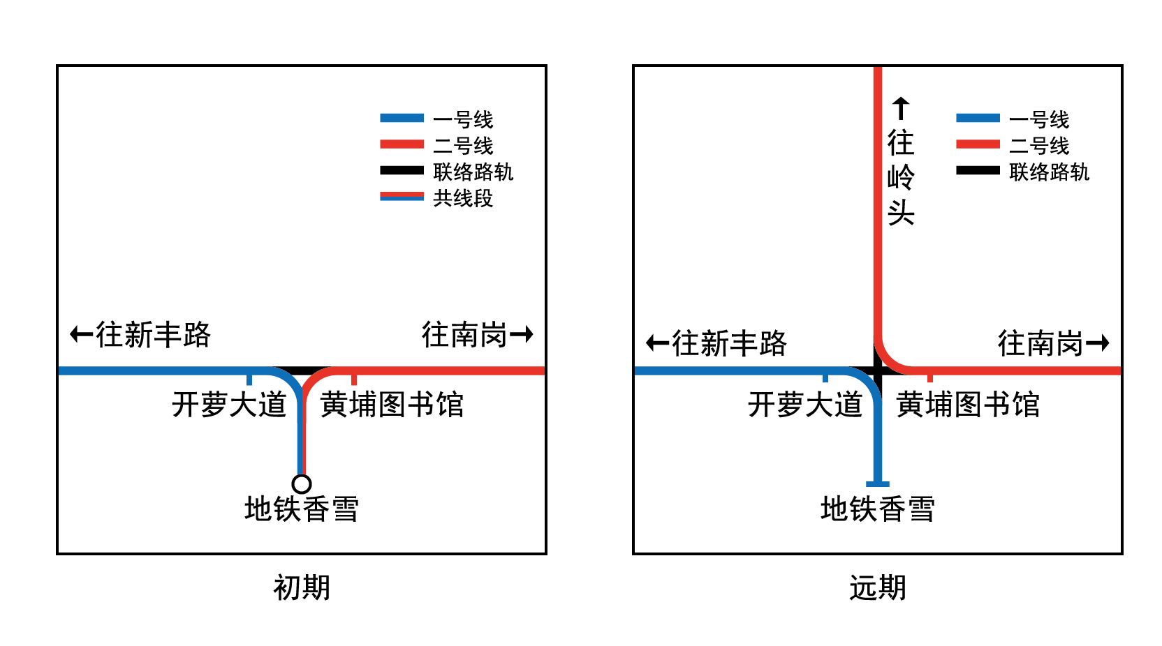 黄埔有轨电车2号线远期将向北延长，不再和1号线共线